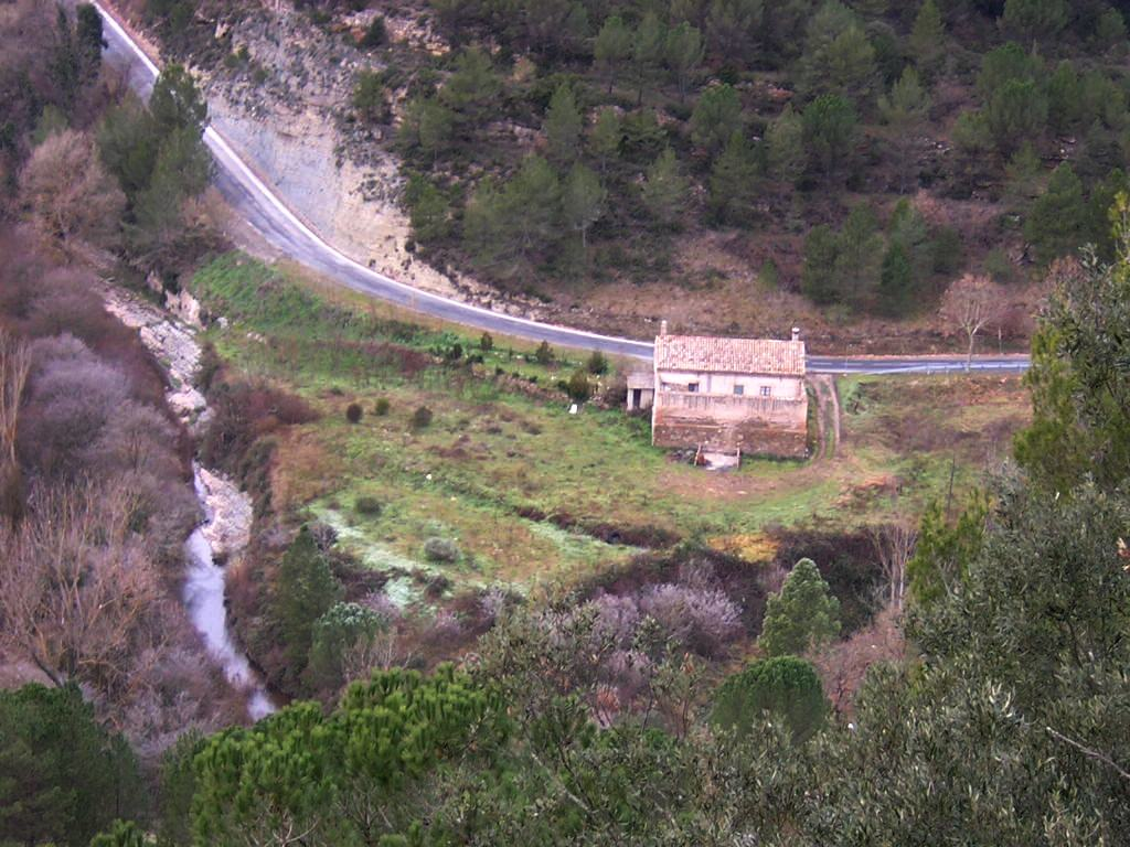 La Casella (Monistrol de Calders, Moianès)